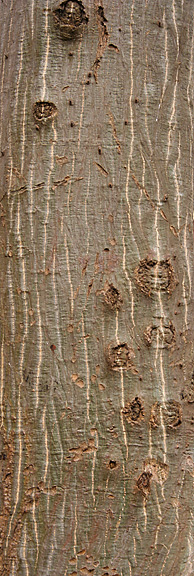 Indian Coral Tree Erythrina variegata in Kolkata, West Bengal, India.